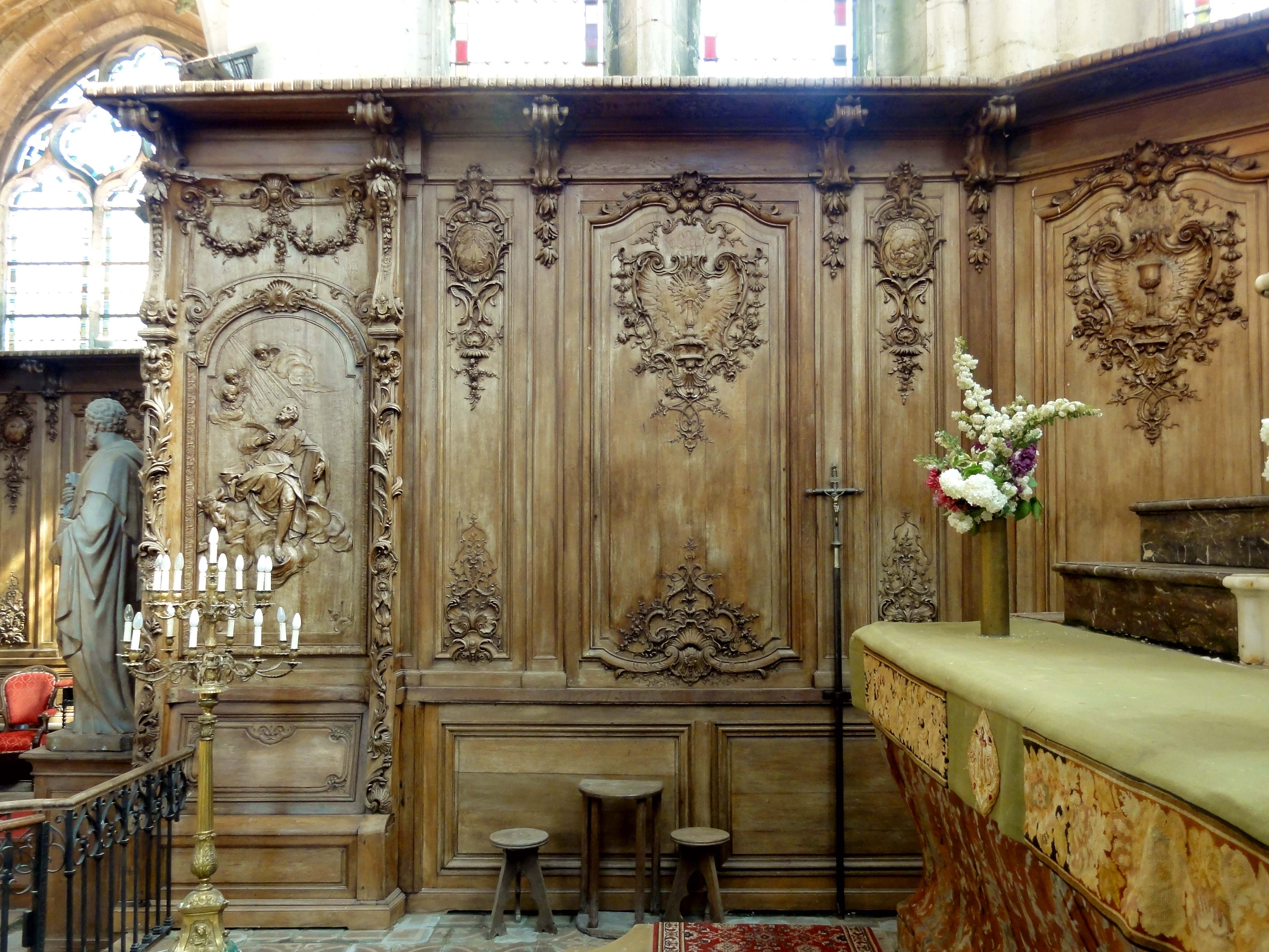 Boiseries provenant de l'abbaye de Chaalis (voir titre).